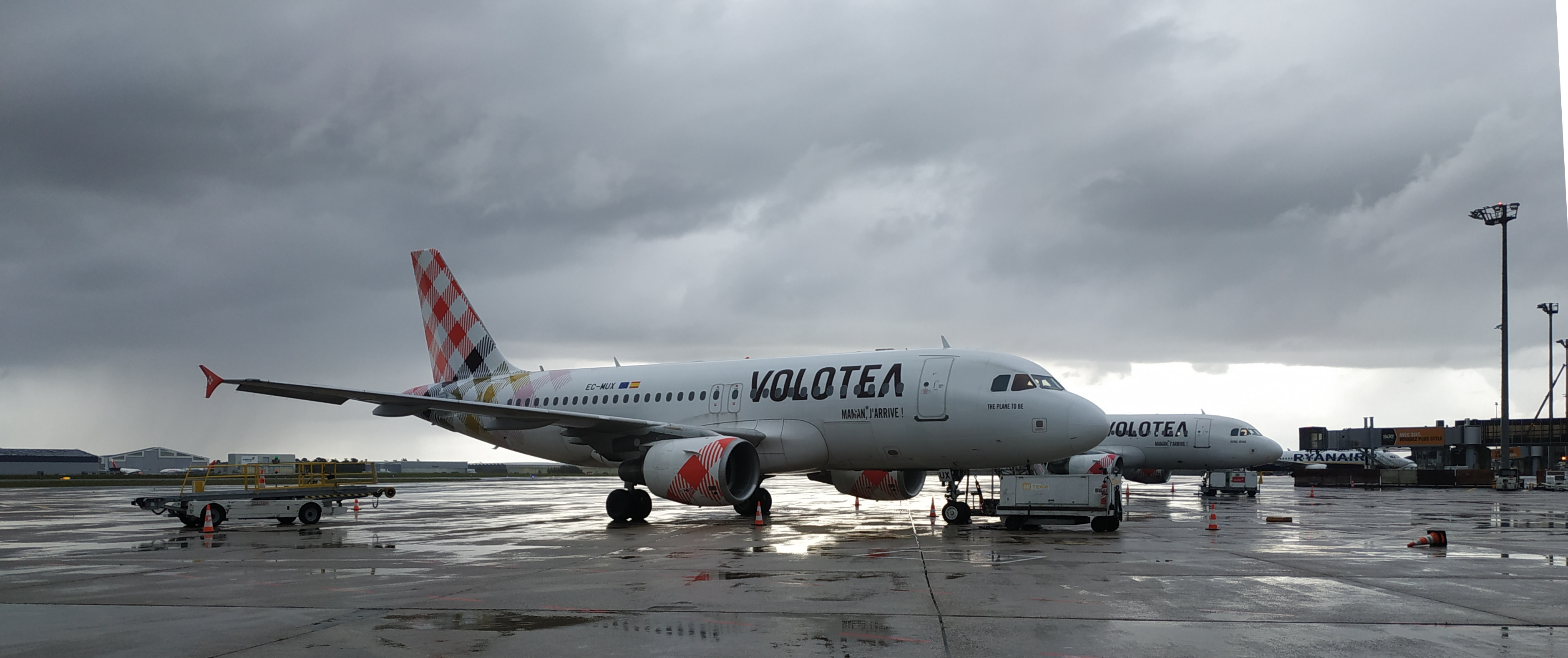 Airibus de la compagnie Volotea à l'aéroport de Bordeaux Merignac